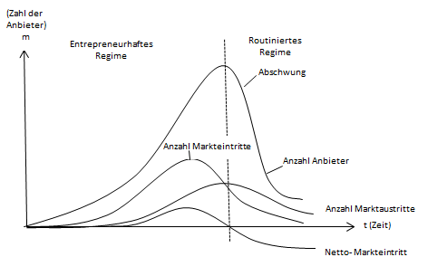 Industrielebenszyklus der Marktdynamik